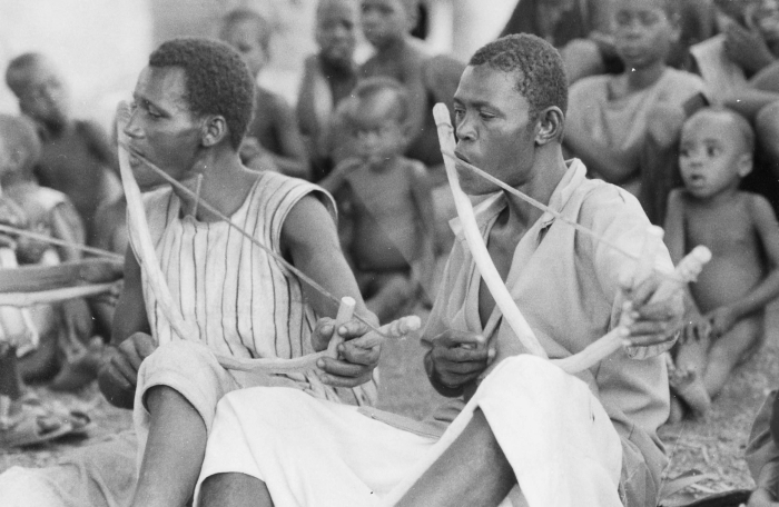 De opname is gemaakt tijdens één van de twee verzamelexpedities die het Tropenmuseum in 1970-1971 ondernam ter voorbereiding op de grote tentoonstelling in 1971-1972, getiteld 'Samo. Een Afrikaans Savannevolk in ontwikkeling'. De expedities duurden elk drie maanden en werden uitgevoerd door de heren J.T. Broekhuijse en F.M. Cowan. Een foto van dit gezelschap staat ook afgebeeld in de catalogus bij de hierboven genoemde tentoonstelling met het bijschrift 'Het dorpsorkest treedt op bij bijzondere gelegenheden' (1971: 13).